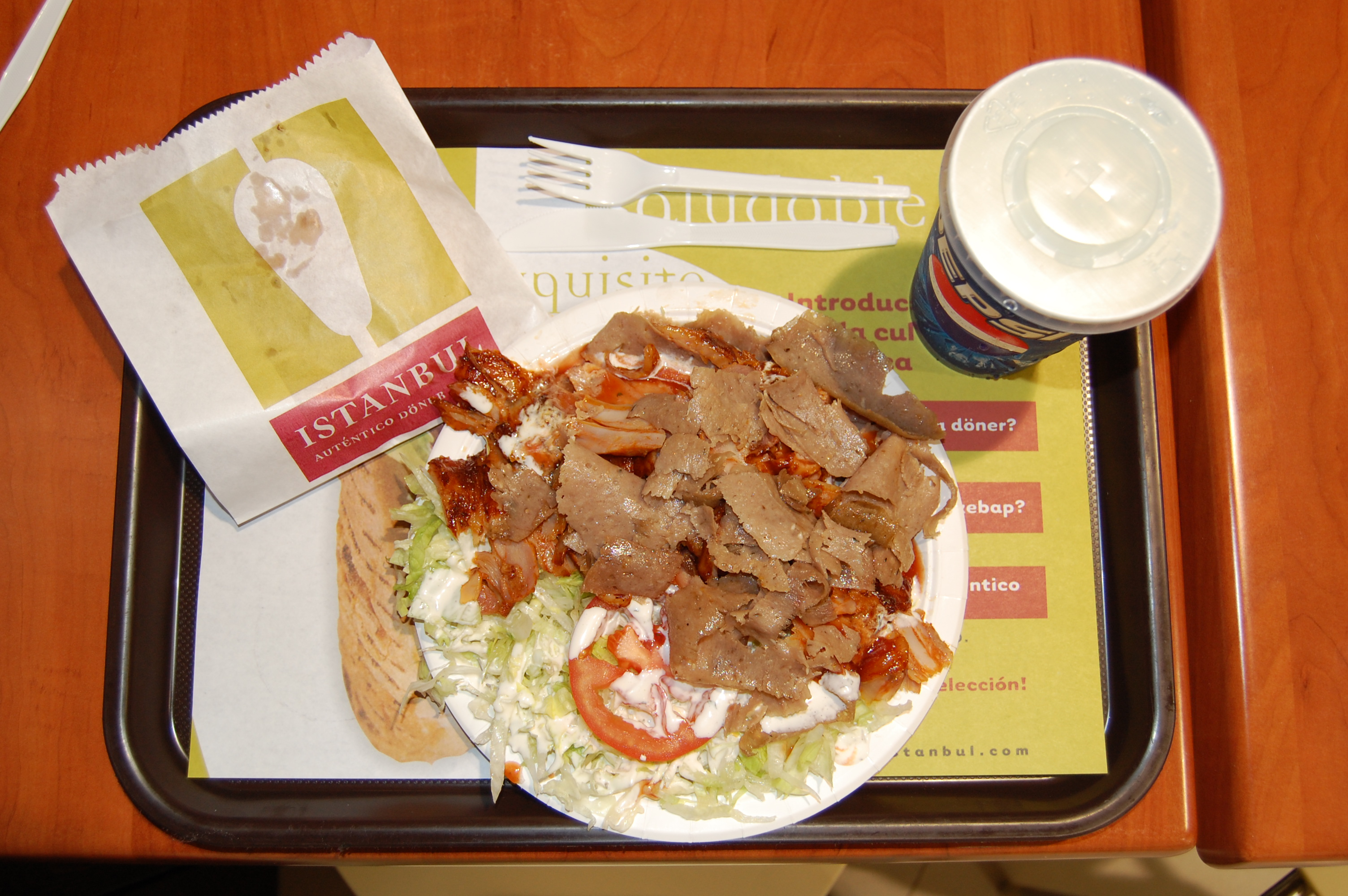 Prato de döner e tavuk num restaurante fast-food no Centro Comercial Gran Vía de Vigo.